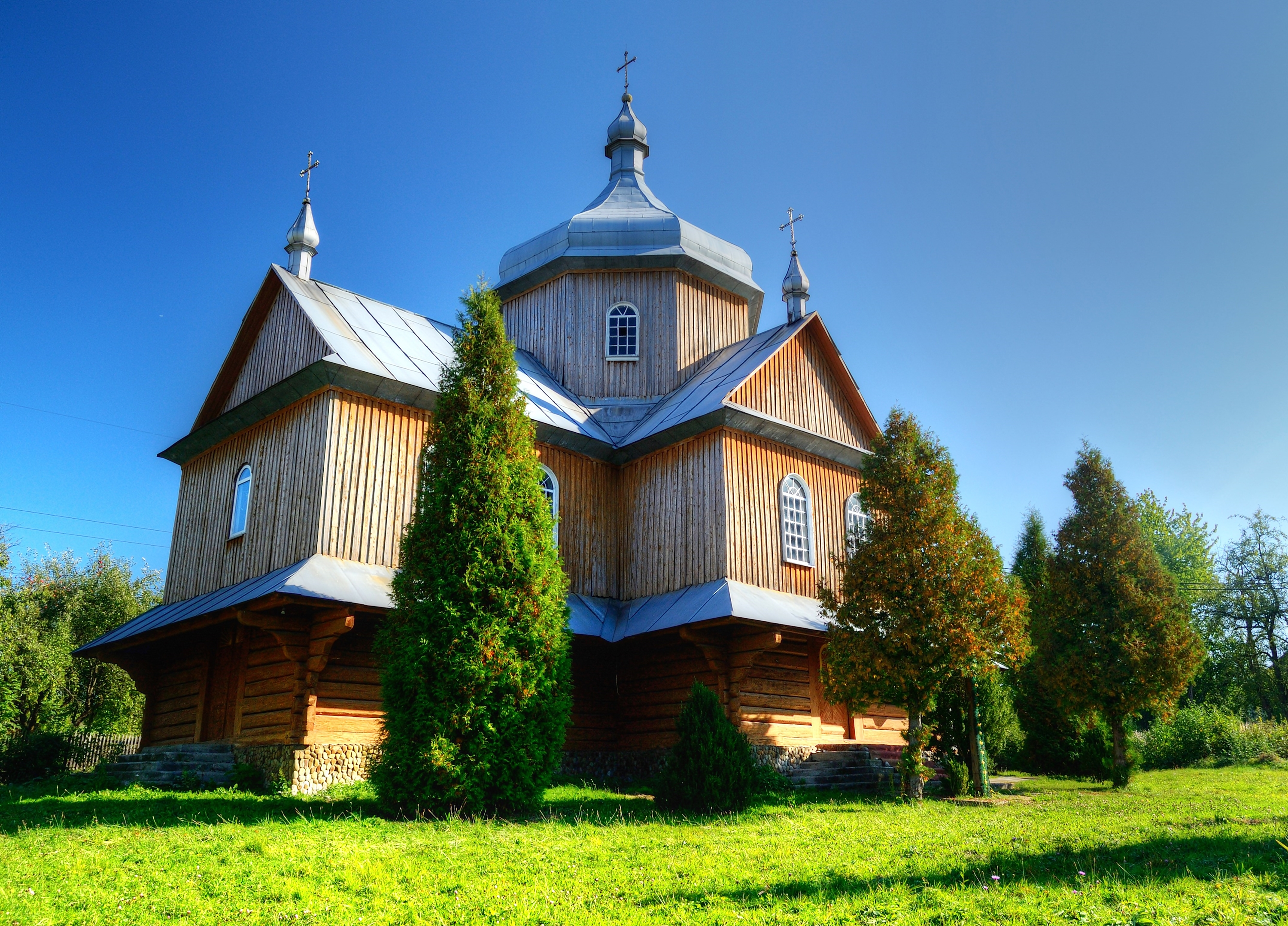 Церква 1898